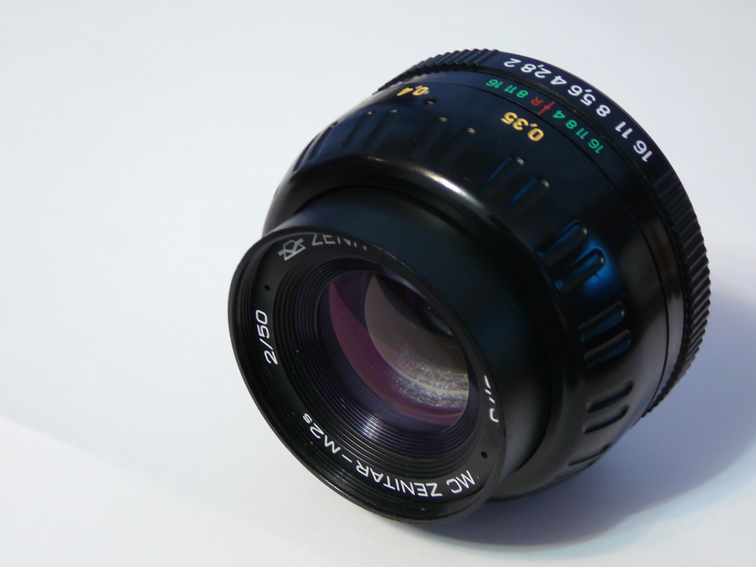 Объектив МС Зенитар-М2с